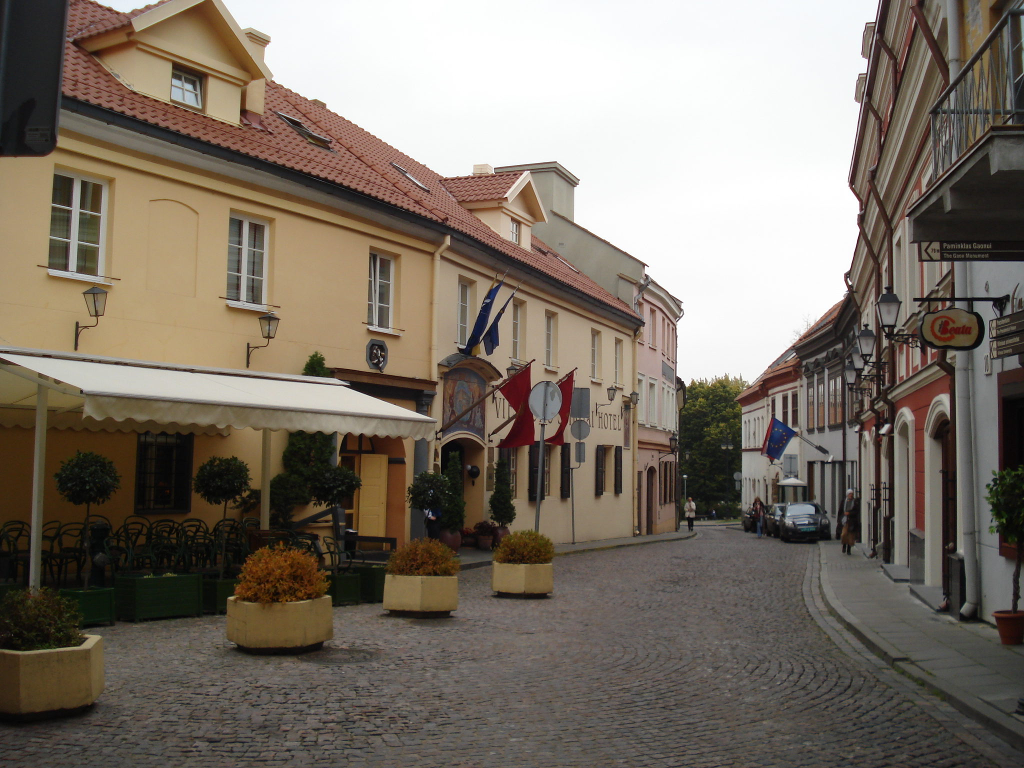 Gaono gatvė (Gaono street) in Vilnius. Restaurant Stikliai, hotel Stikliai (left side)